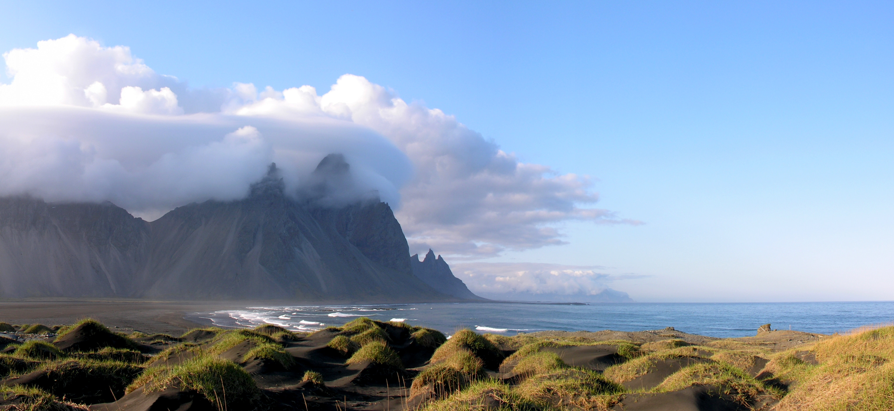 Iceland, Stokksnes